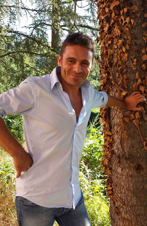 Rosario Rosanova in relax